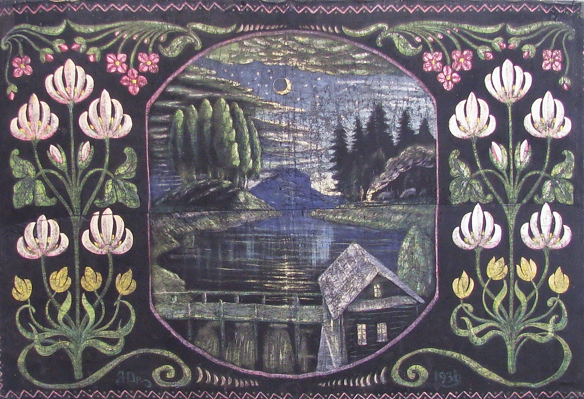 Дыванок з млынам. Палатно, алей